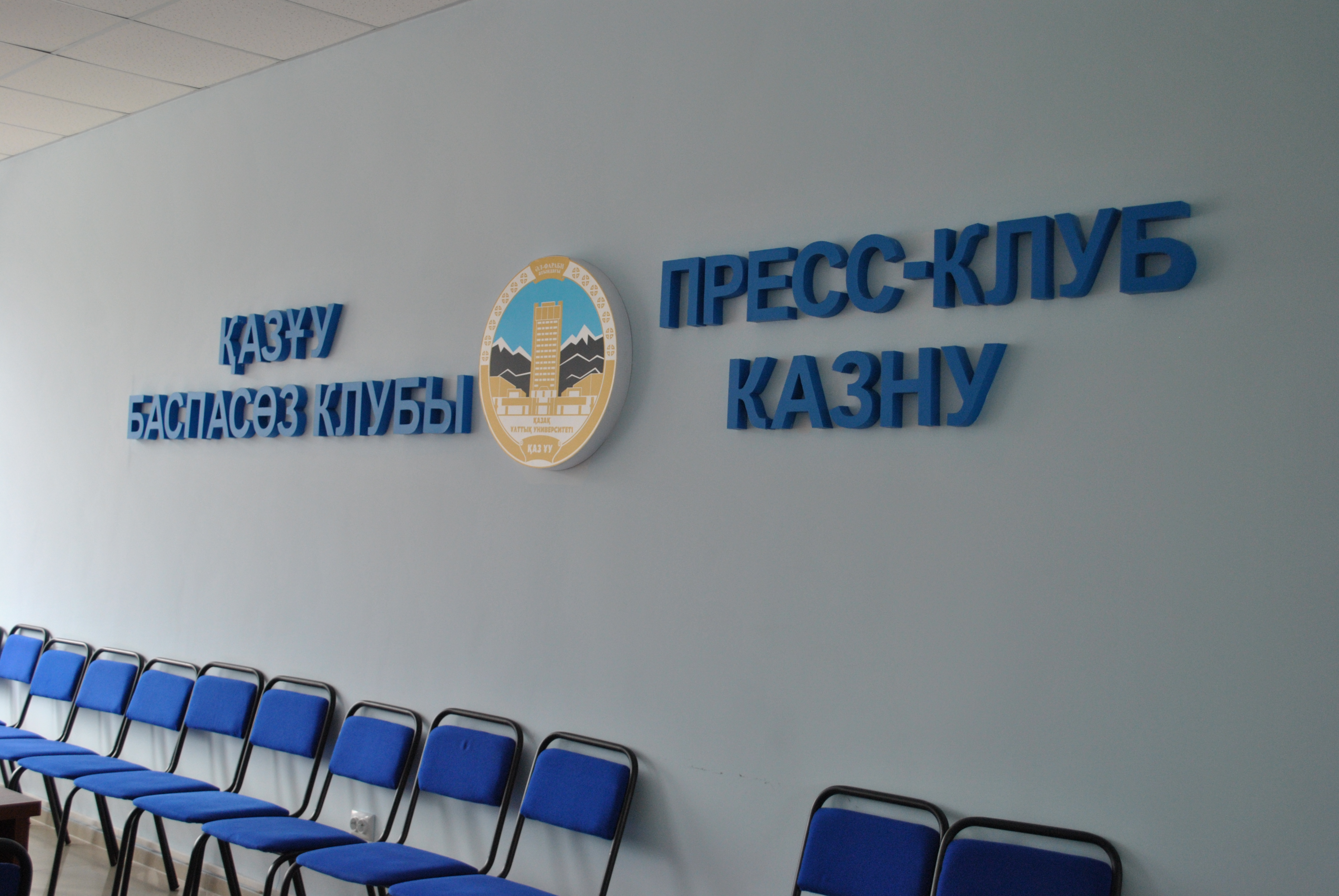 Қазақ ұлттық университетінің Баспасөз орталығы